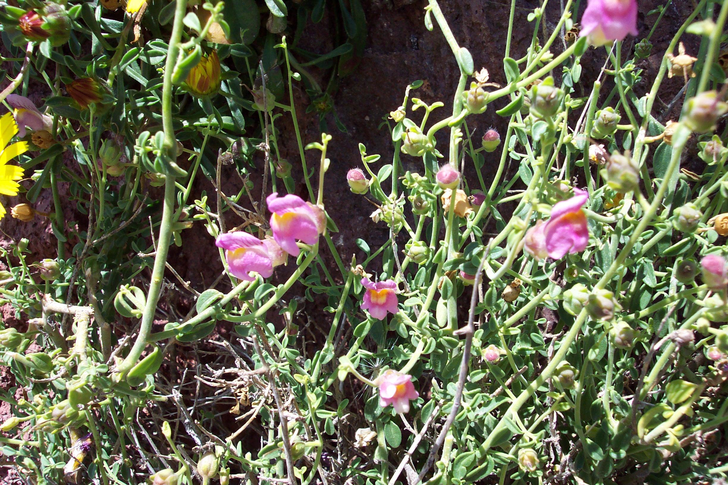 Fotografía de dragoncillo del Cabo de Gata, Almería (España).